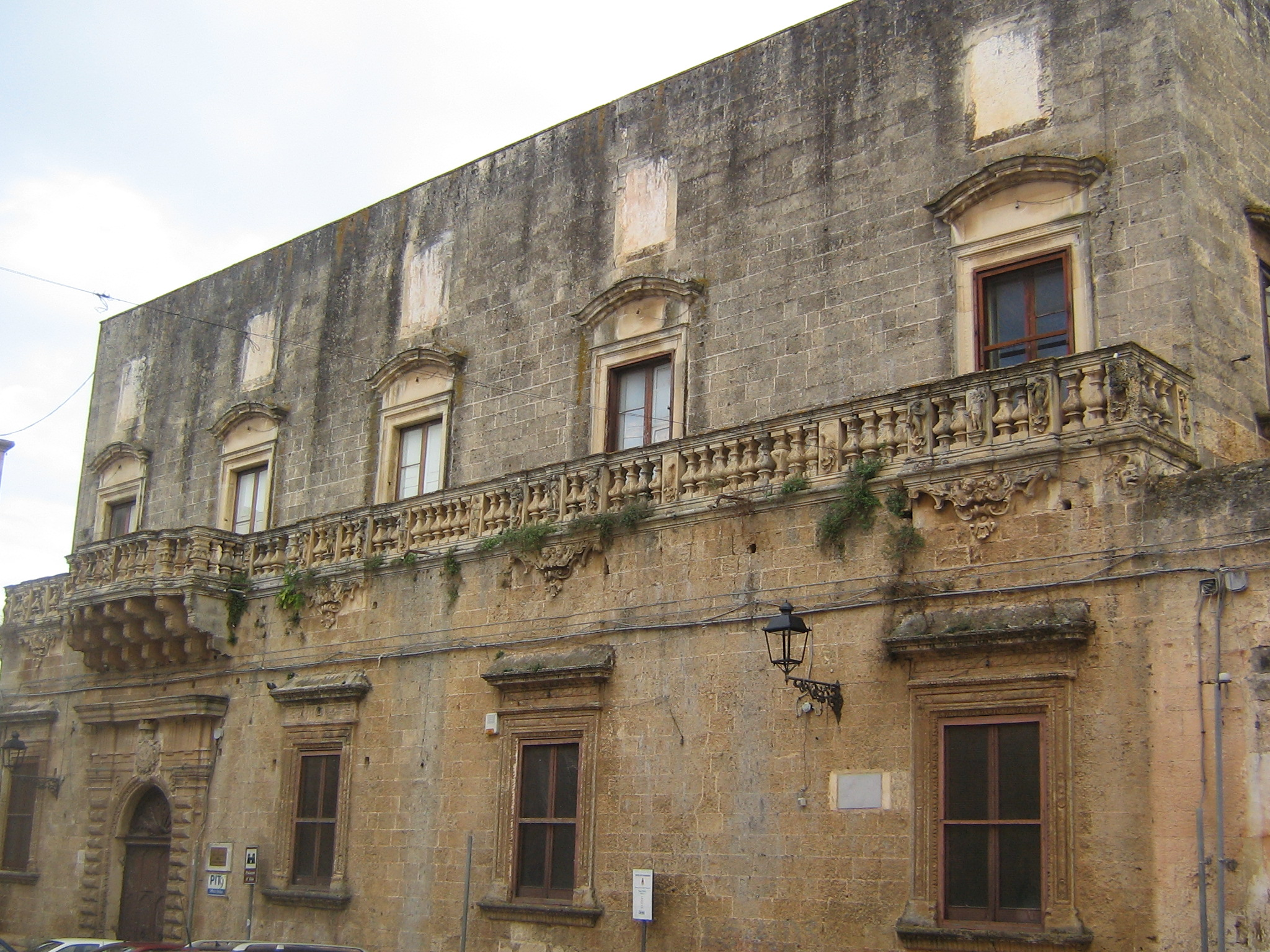 Palazzo D'Elia Casarano